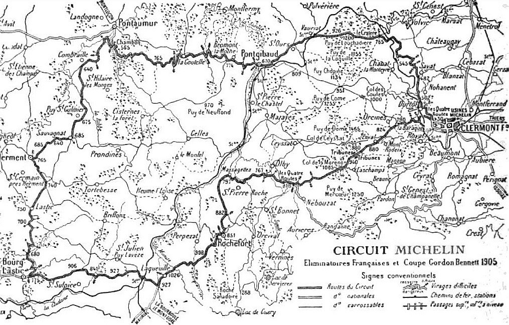 Coupe Gordon Bennett 1905 (Auvergne) - Histoire de l'automobile, Pierre Souvestre, éd. H. Dunod et E. Pinat, 1907 (ASIN B001BPBE58) p.668